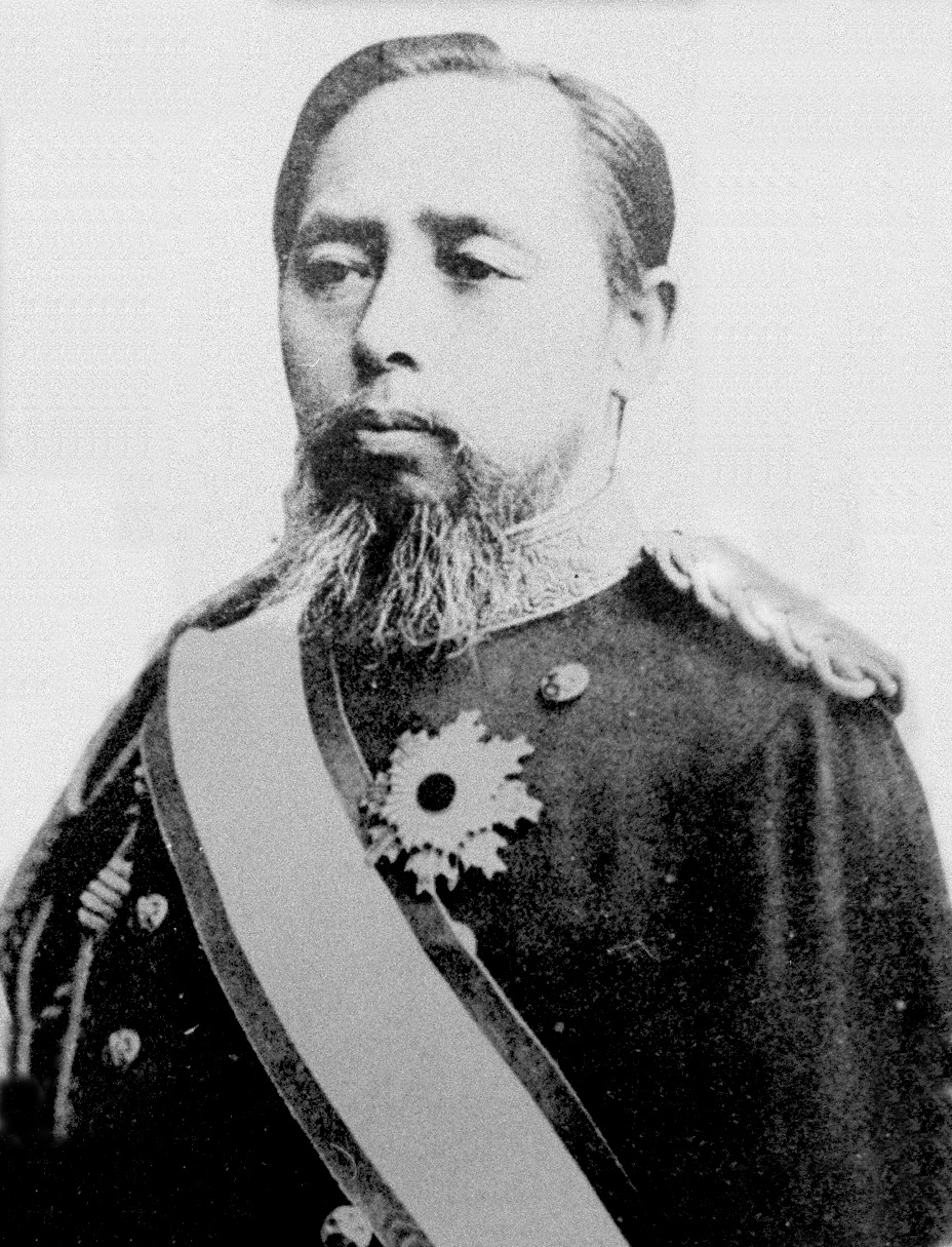 Portrait of Yamada Akiyoshi (山田顕義, 1844 – 1892)